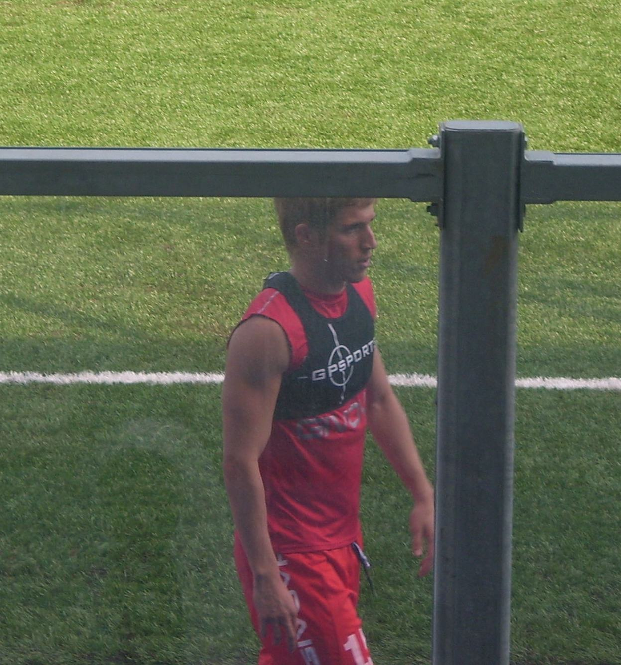 Sergio Gontán KekoKeko al centro sportivo Torre del Grifo Village